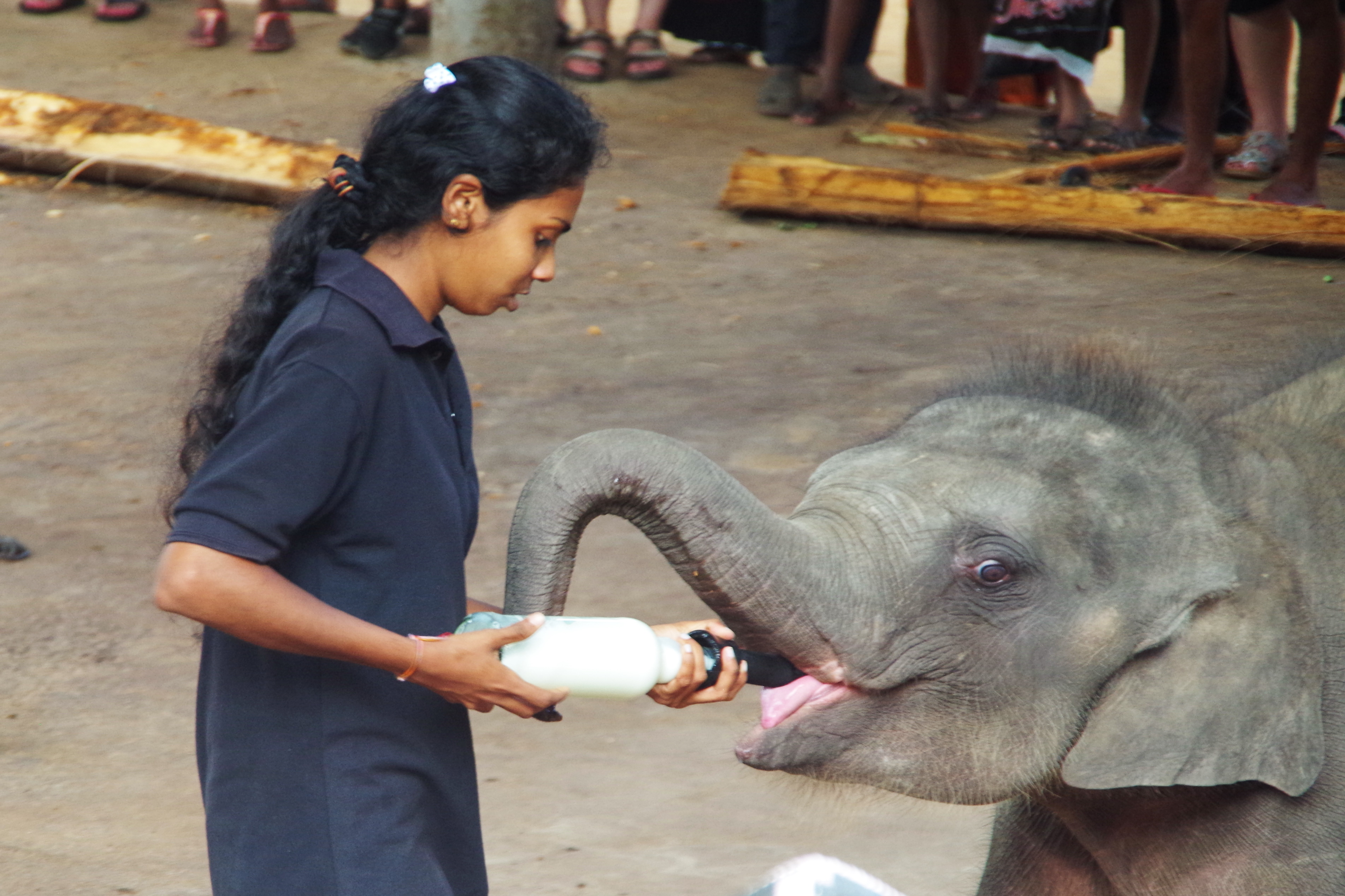 Pinnawala Elephant Orphanage, Fütterung